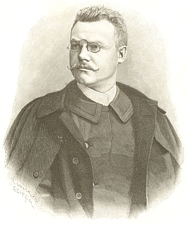 Franz Xaver Reitterer (1868 - 1932), Český a rakouský nakladatel a politik německé národnosti.